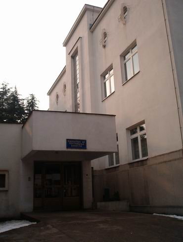 Interno odeljenje VB Niš